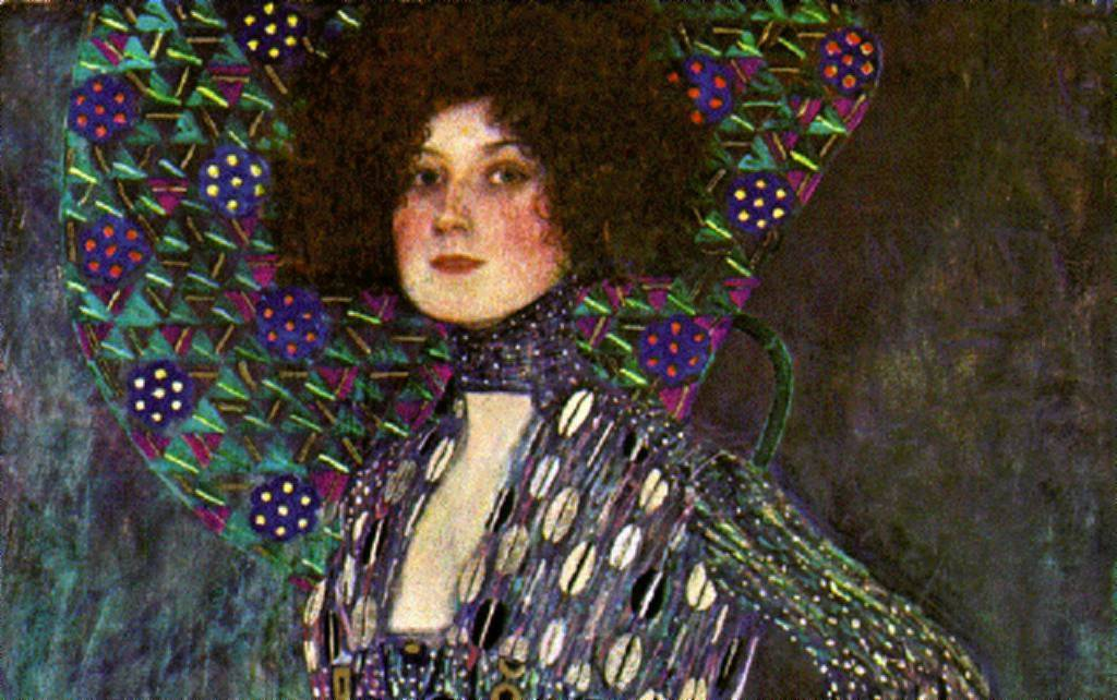 detail